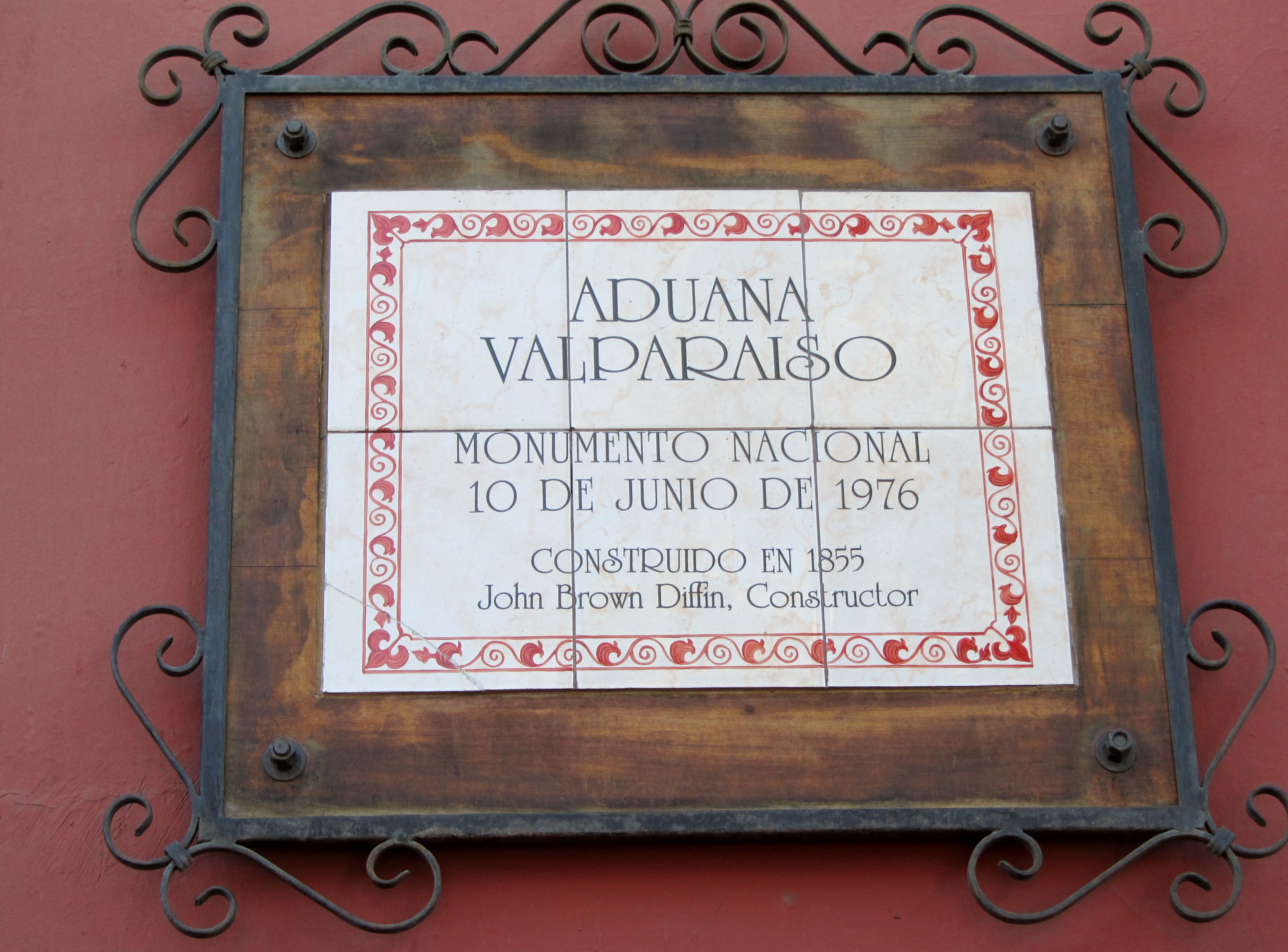 Placa en el edificio de la antigua aduana construido en 1855 por John Brown Diffin y declarado Munumento Nacional de Chile el 10 de junio de 1976, plaza Wheelwrjght, Valparaíso